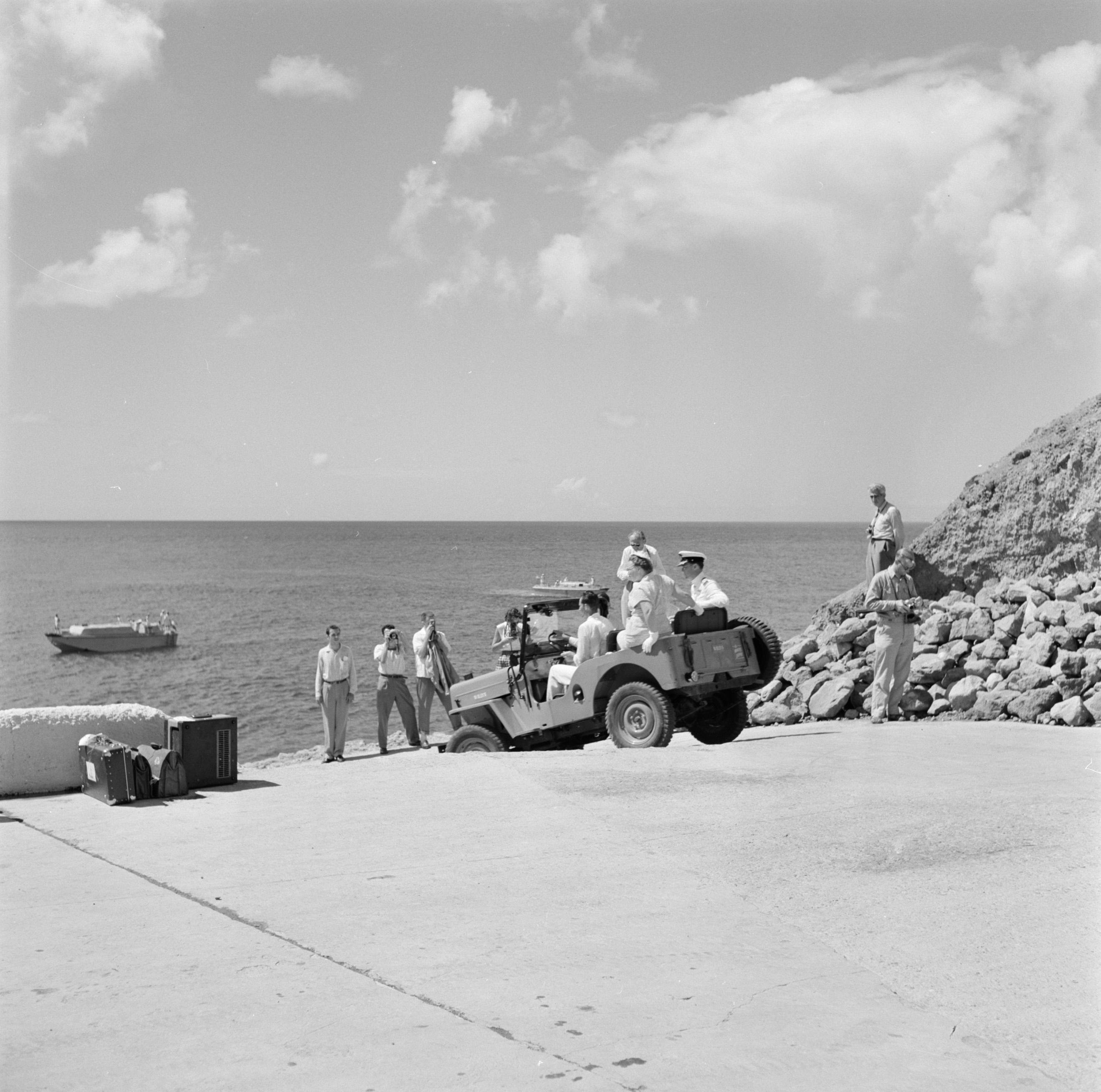 Collectie / Archief : Fotocollectie Van de Poll Reportage / Serie : Nederlandse Antillen en Suriname ten tijde van het koninklijk bezoek van koningin Juliana en prins Bernhard in 1955 Beschrijving : Aankomst van het koninklijk paar per jeep aan het strand van Saba Datum : 26 oktober 1955 Locatie : Nederlandse Antillen, Saba Trefwoorden : koninklijke bezoeken, stranden Fotograaf : Poll, Willem van de Auteursrechthebbende : Nationaal Archief Materiaalsoort : Negatief (zwart/wit) Nummer archiefinventaris : bekijk toegang 2.24.14.02 Bestanddeelnummer : 252-4136